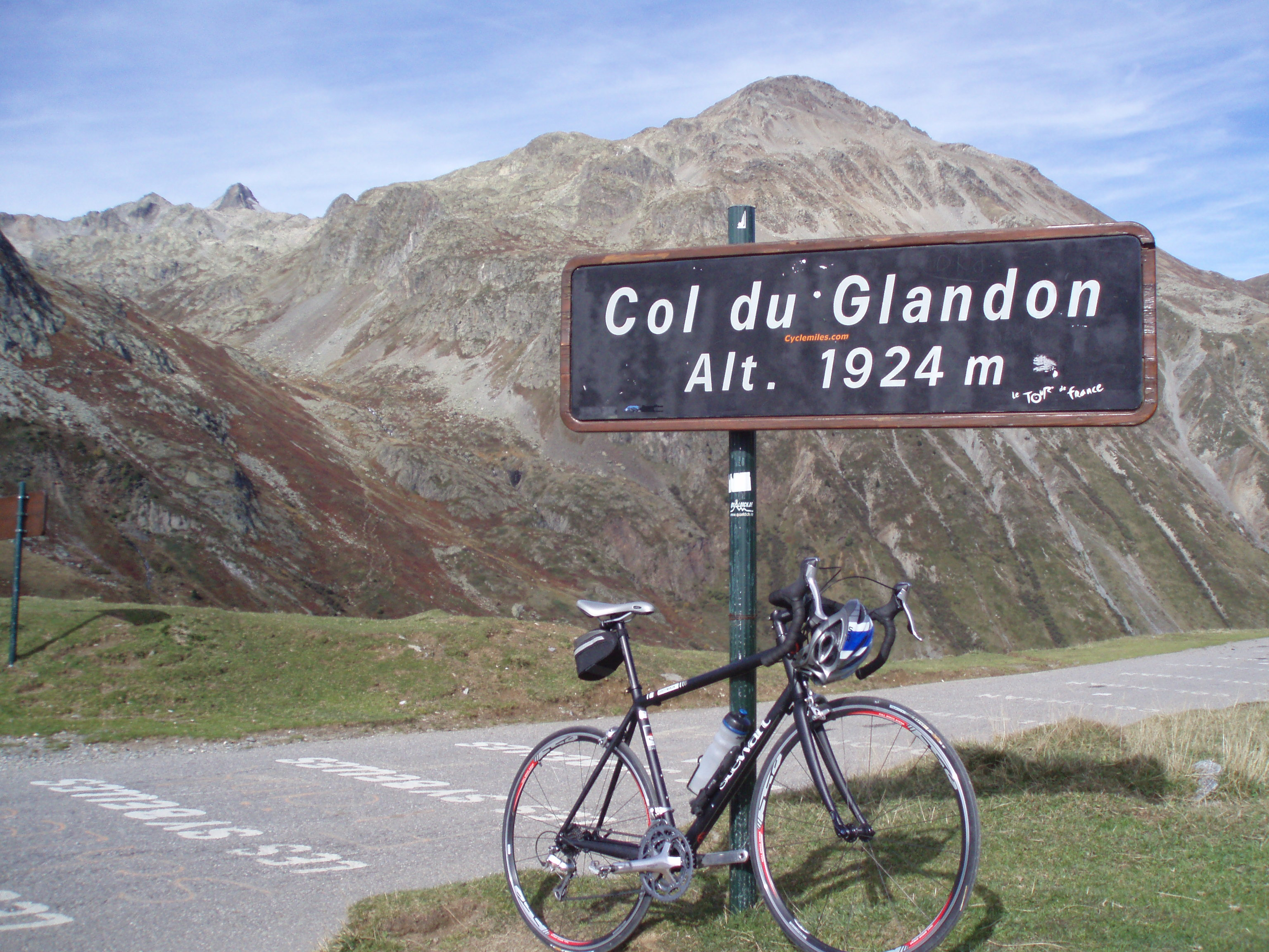 Sommet du Col du Glandon